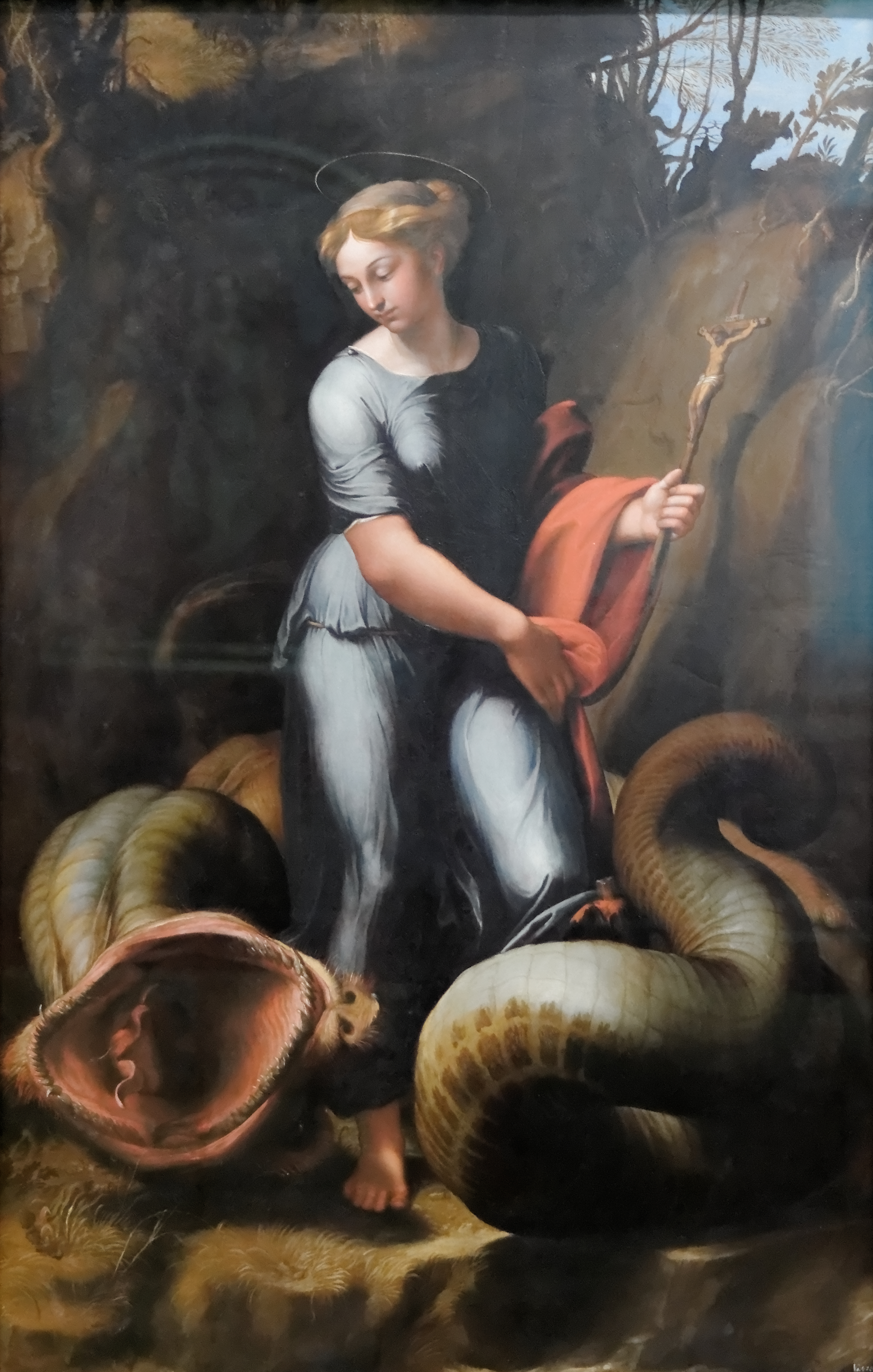 Marguerite d'Antioche, Raphael (ss dir) c 1518. Kunsthistorisches Museum, N° inv GG 171